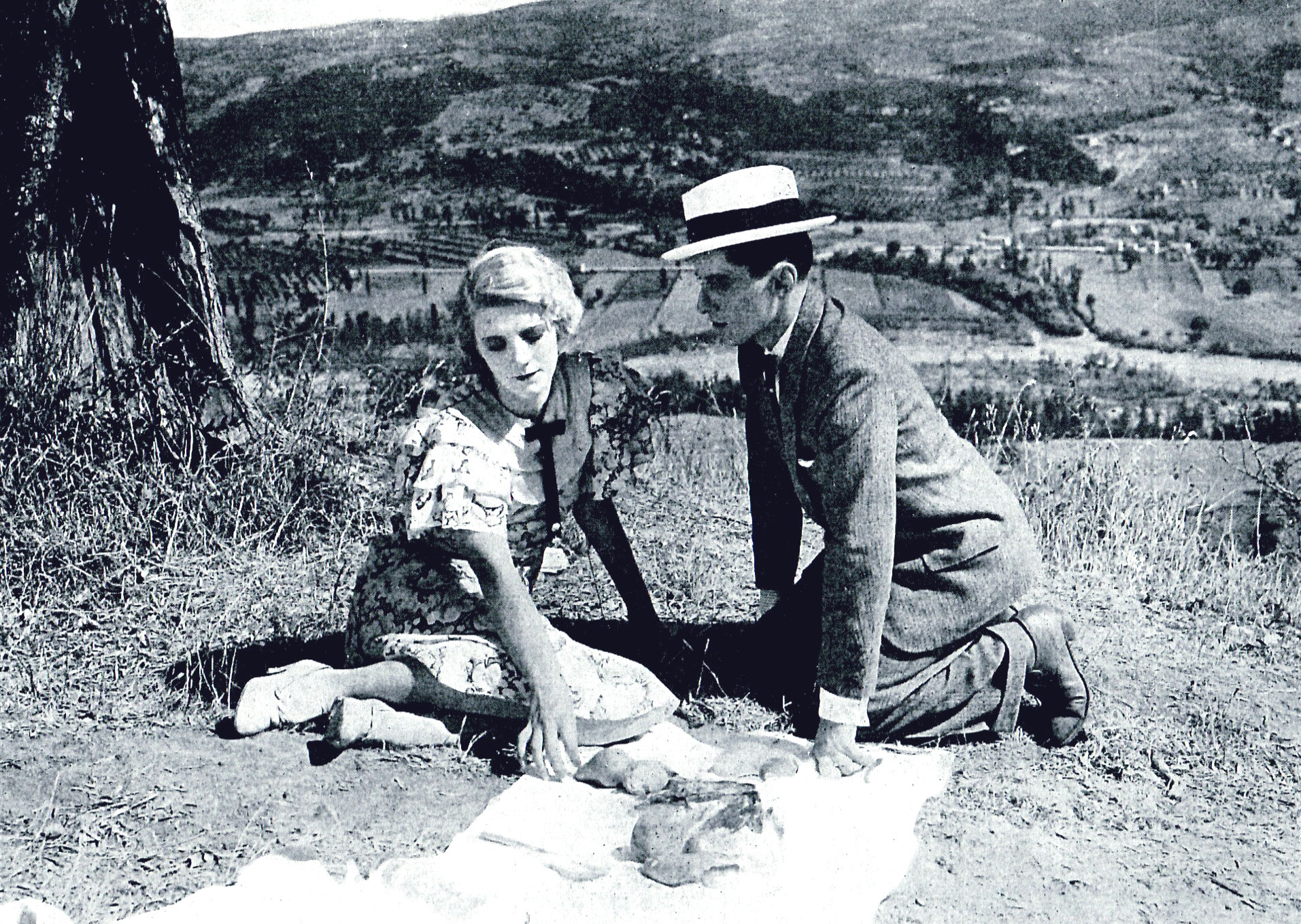 Lina Gennari e Carlo Petrangeli in una scena di "Treno popolare" (Matarazzo, 1933)